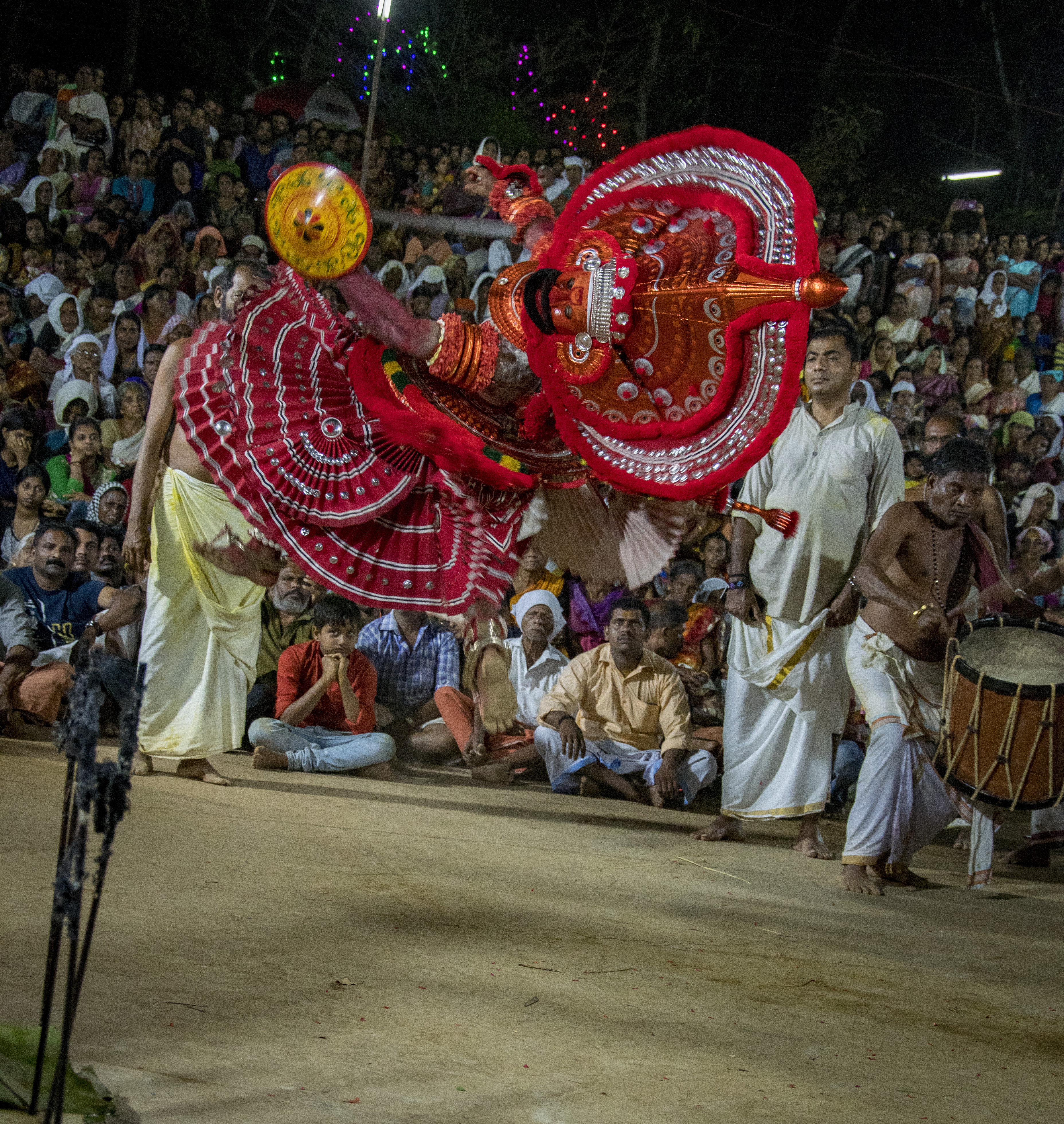 Kadavaankott maakkam Thira at Chala, Kannur